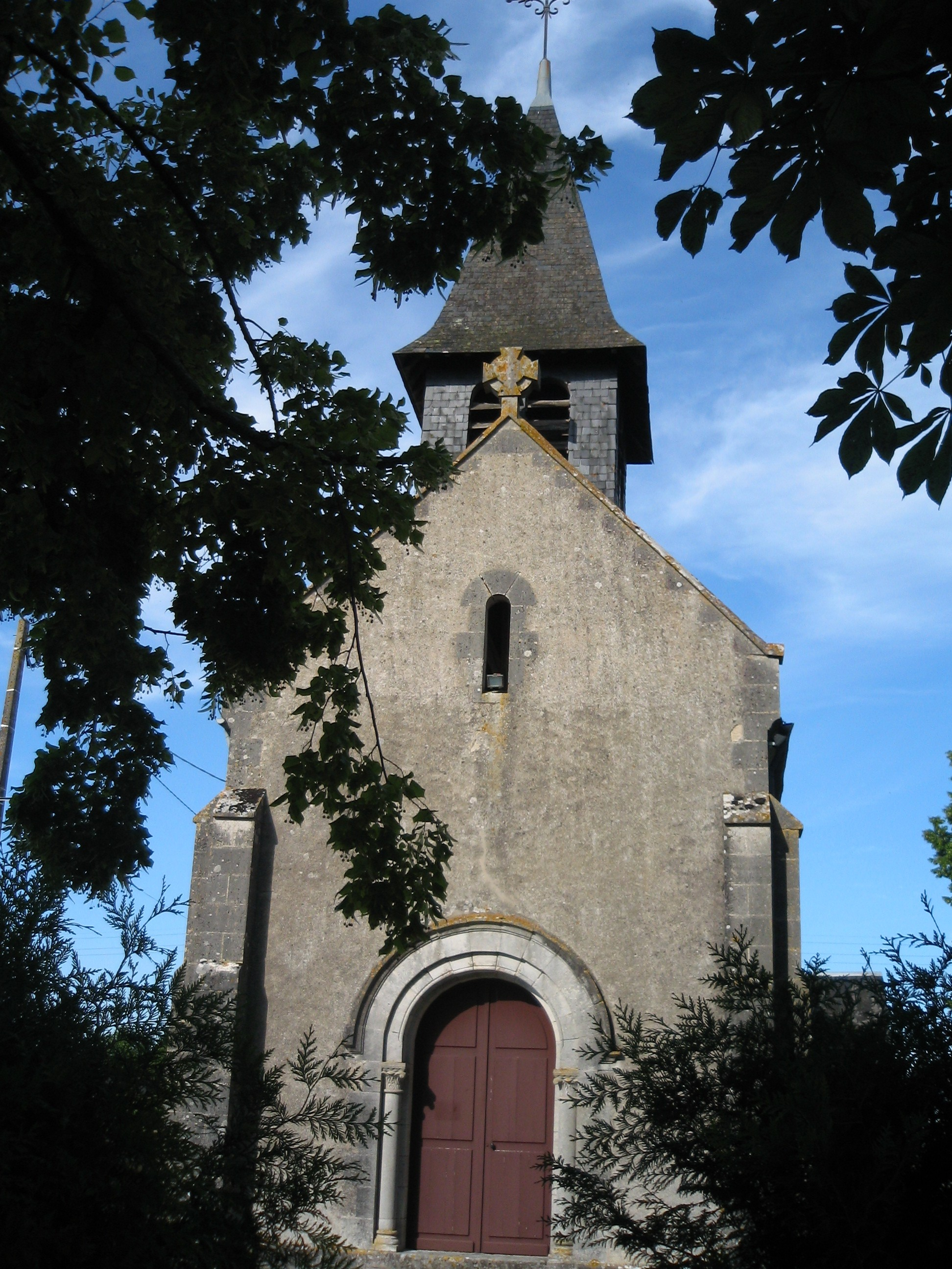 Eglise Saint Pierre, fin XIe et XVIe, Plou.